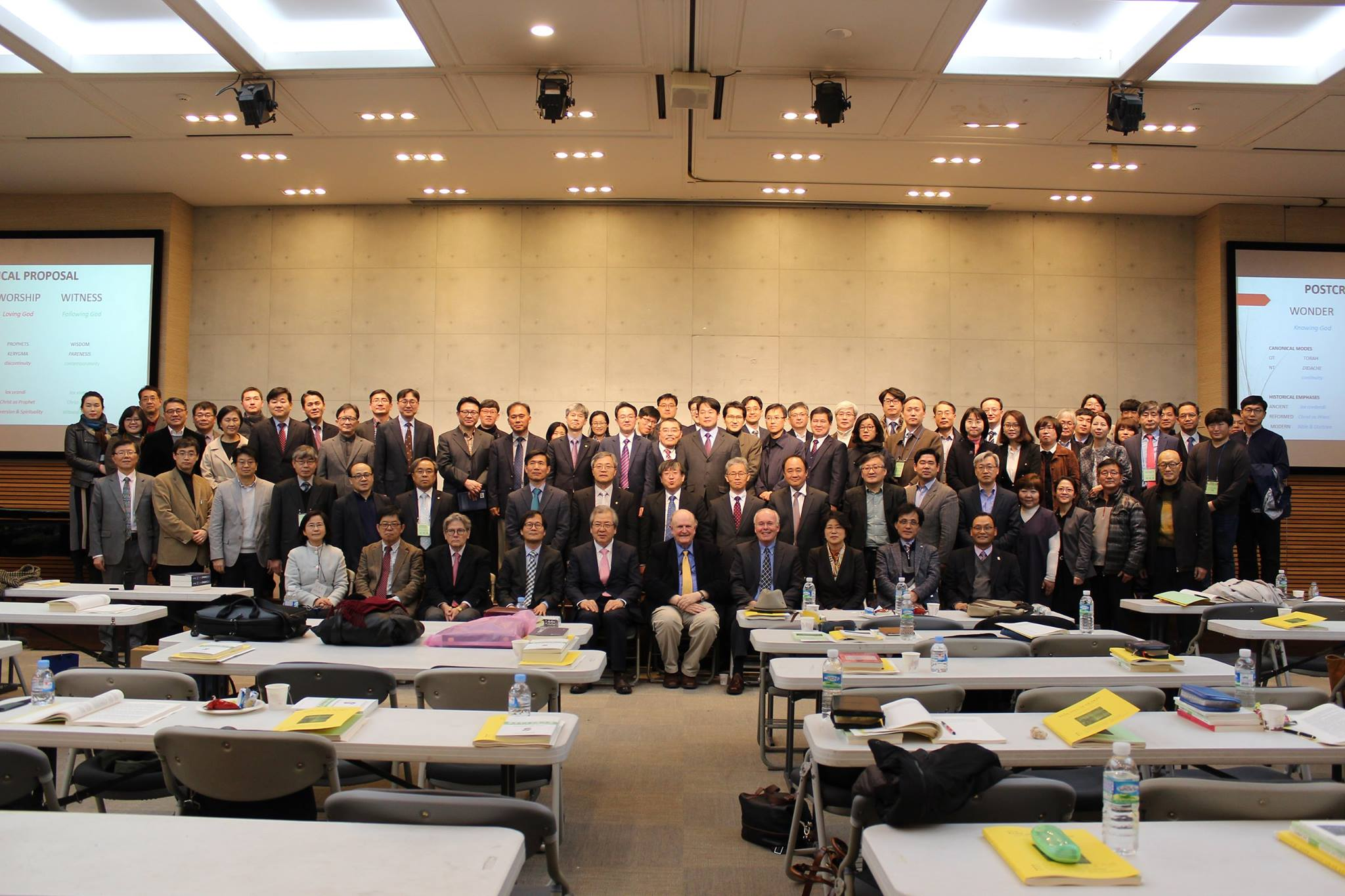 한국장로교신학회와 한국교회사학회 온누리교회 양재동